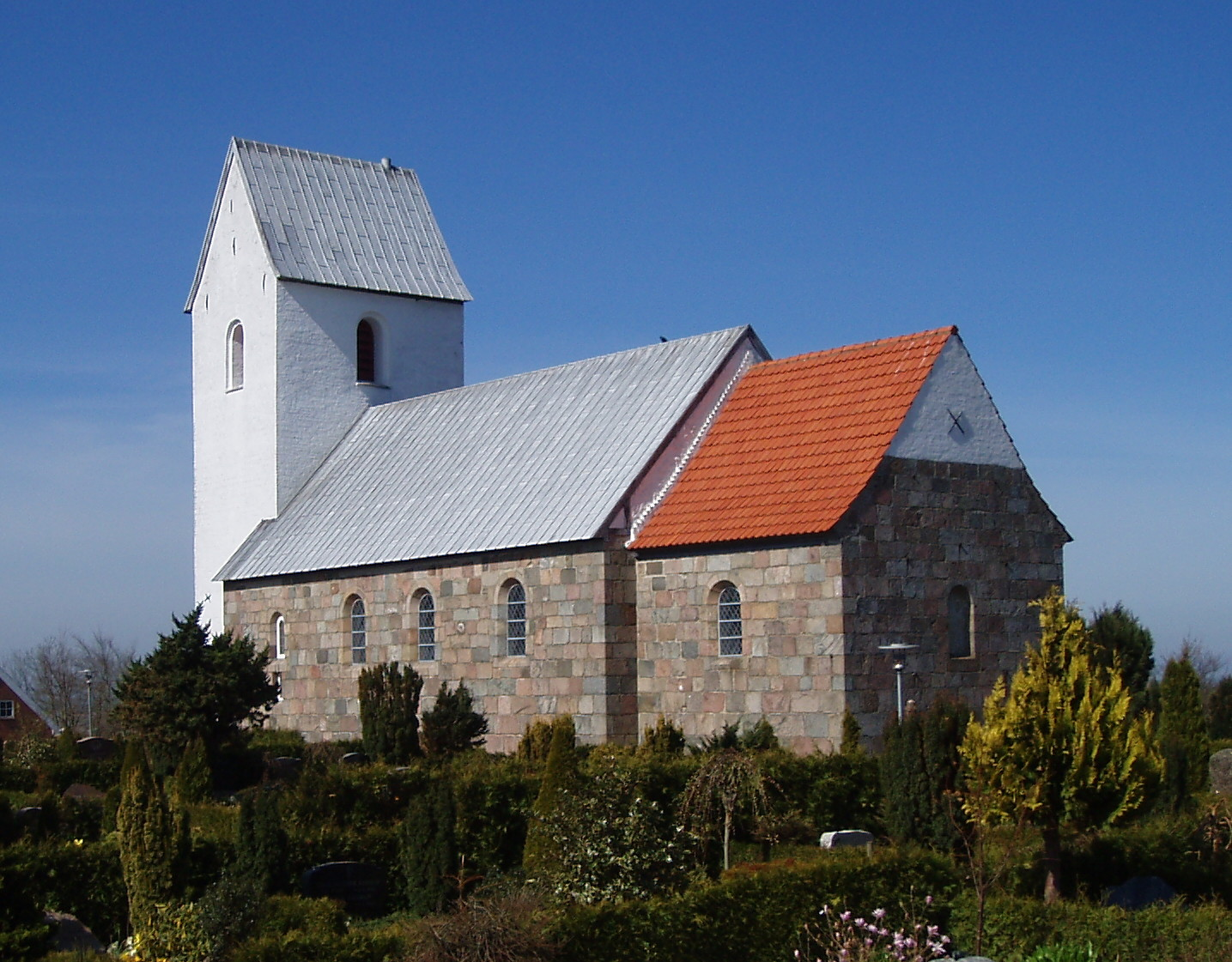 Nørlem Kirke